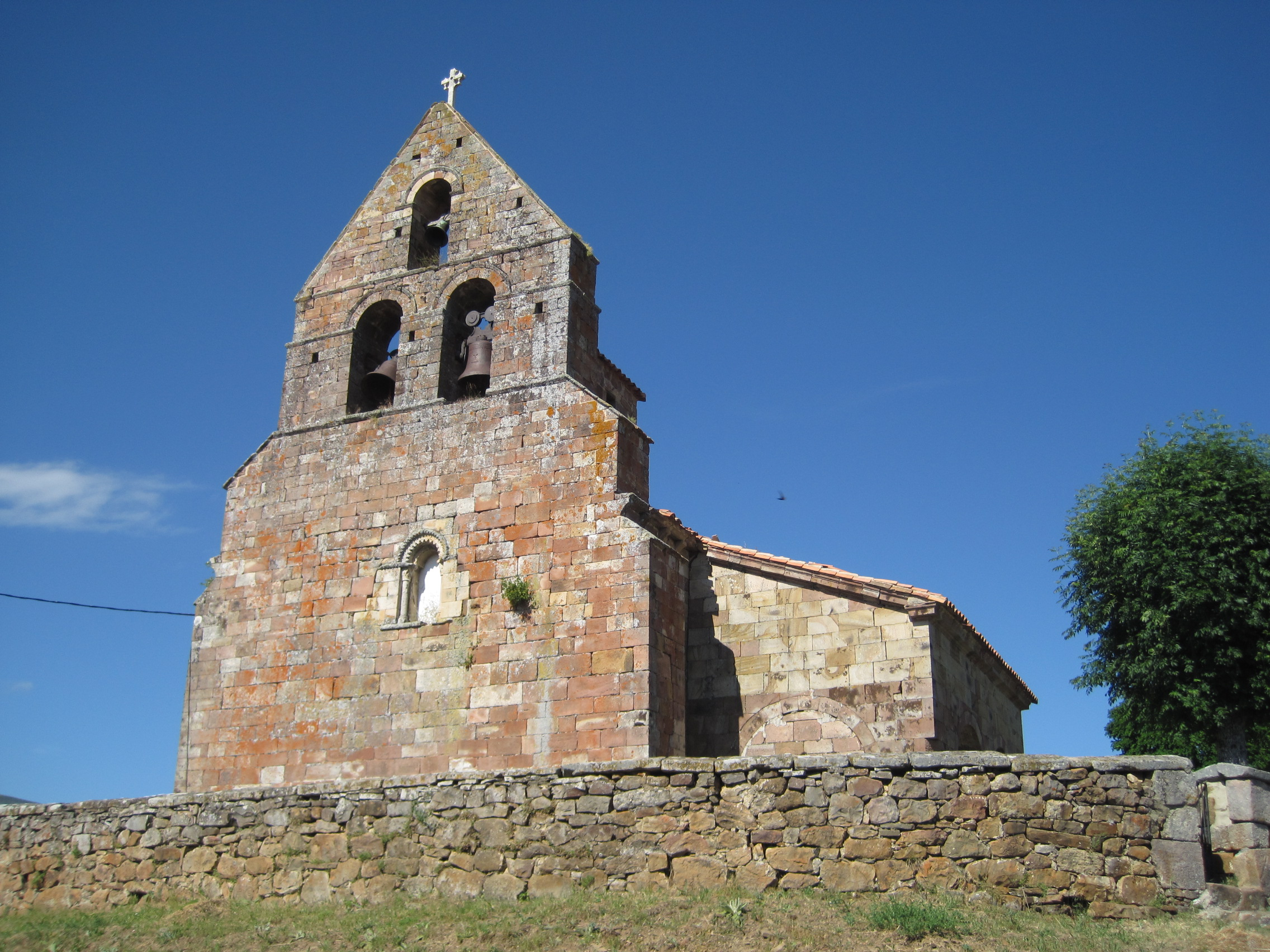 Iglesia de San Cornelio y San Cipriano, en San Cebrián de Mudá (Palencia, España).